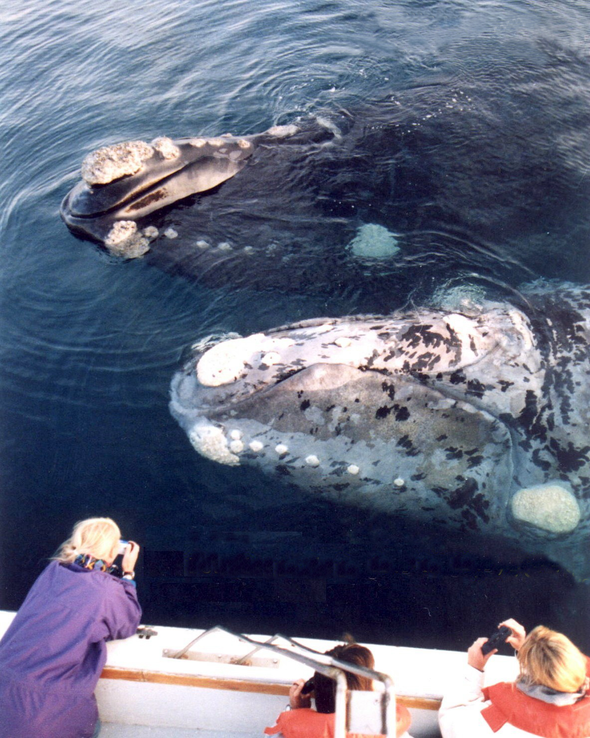 Fotografia ballena Franca Austral